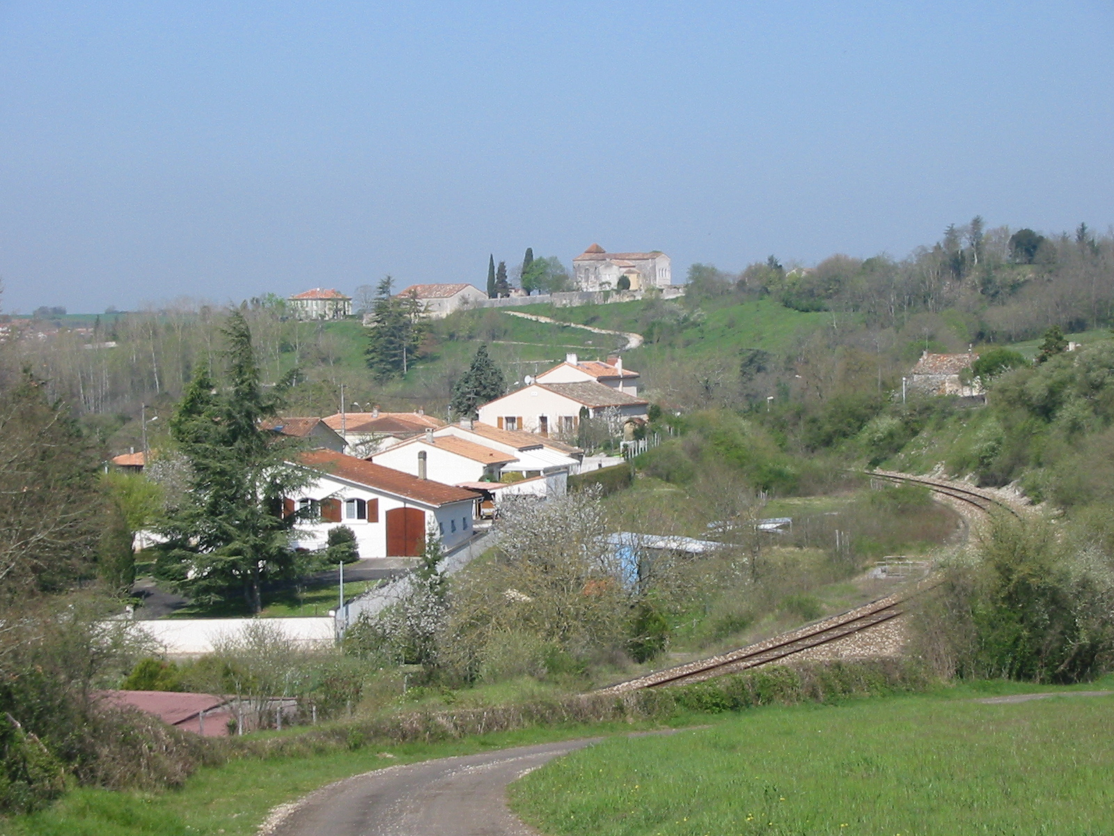 voie ferrée Angoulême-Limoges et bifurcation ancienne voie vers Périgueux à gauche. Touvre, Charente, France